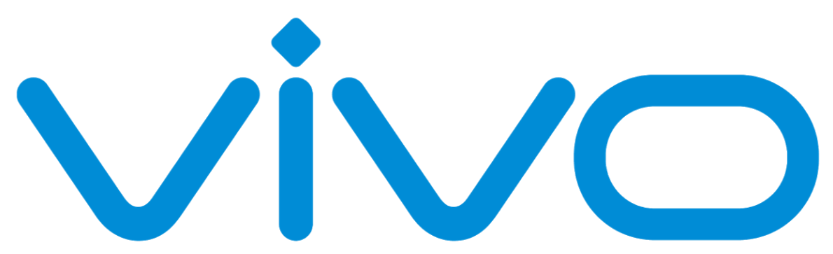 Logo of Vivo Mobile